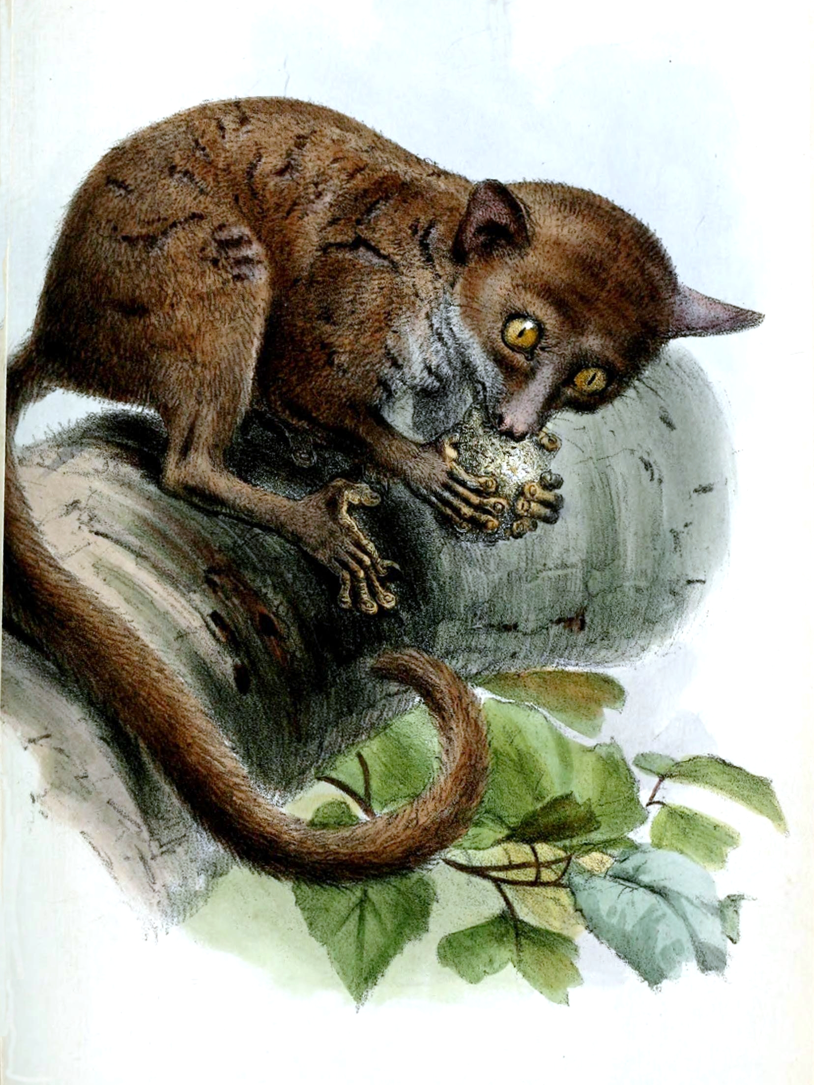 Galago demidoffii